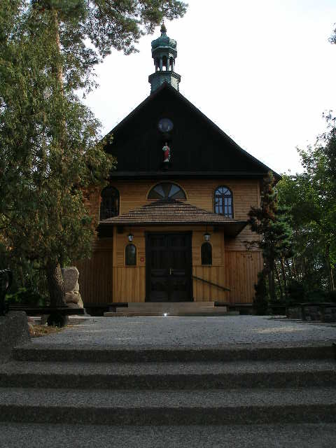 Kościół św. Antoniego Padewskiego w Warszawie (Stara Miłosna)